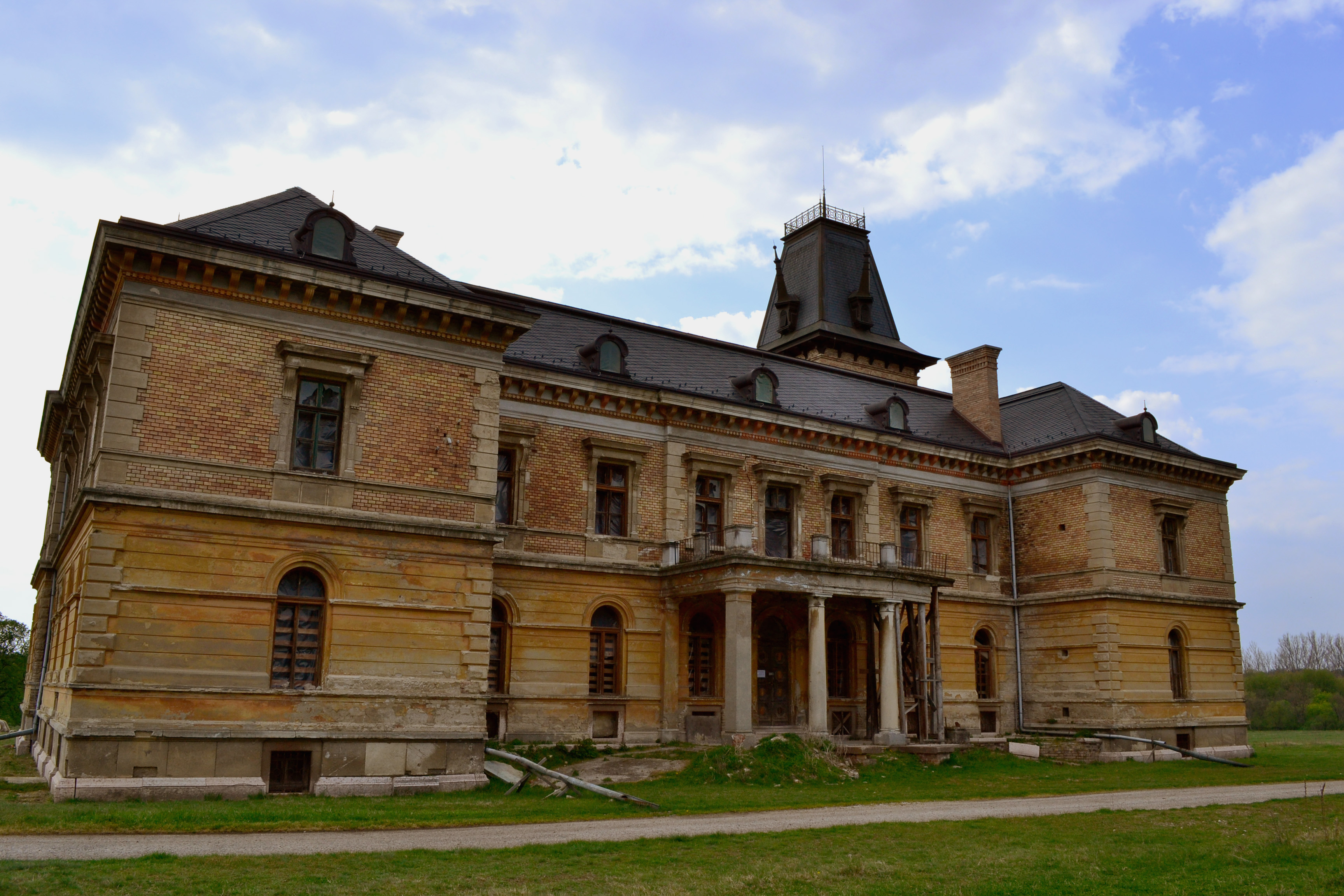 Kégl-kastély (angol)parkja (Székesfehérvár, Csalapuszta)